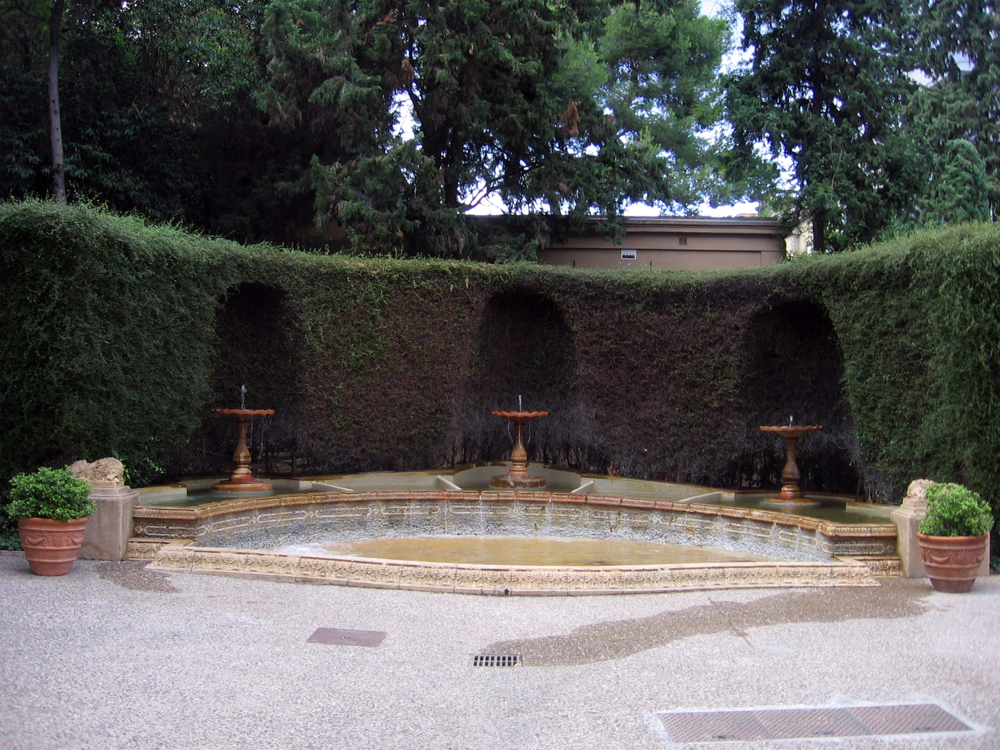 Jardines de la Tamarita.